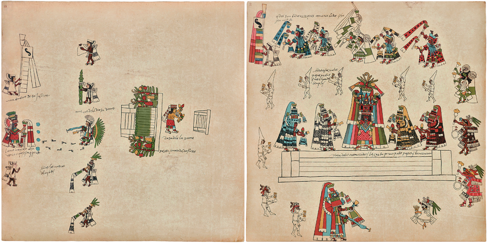 Planches 29 et 30 du codex Borbonicus. Étalonnage des couleurs en correspondance avec l'oeuvre originale.